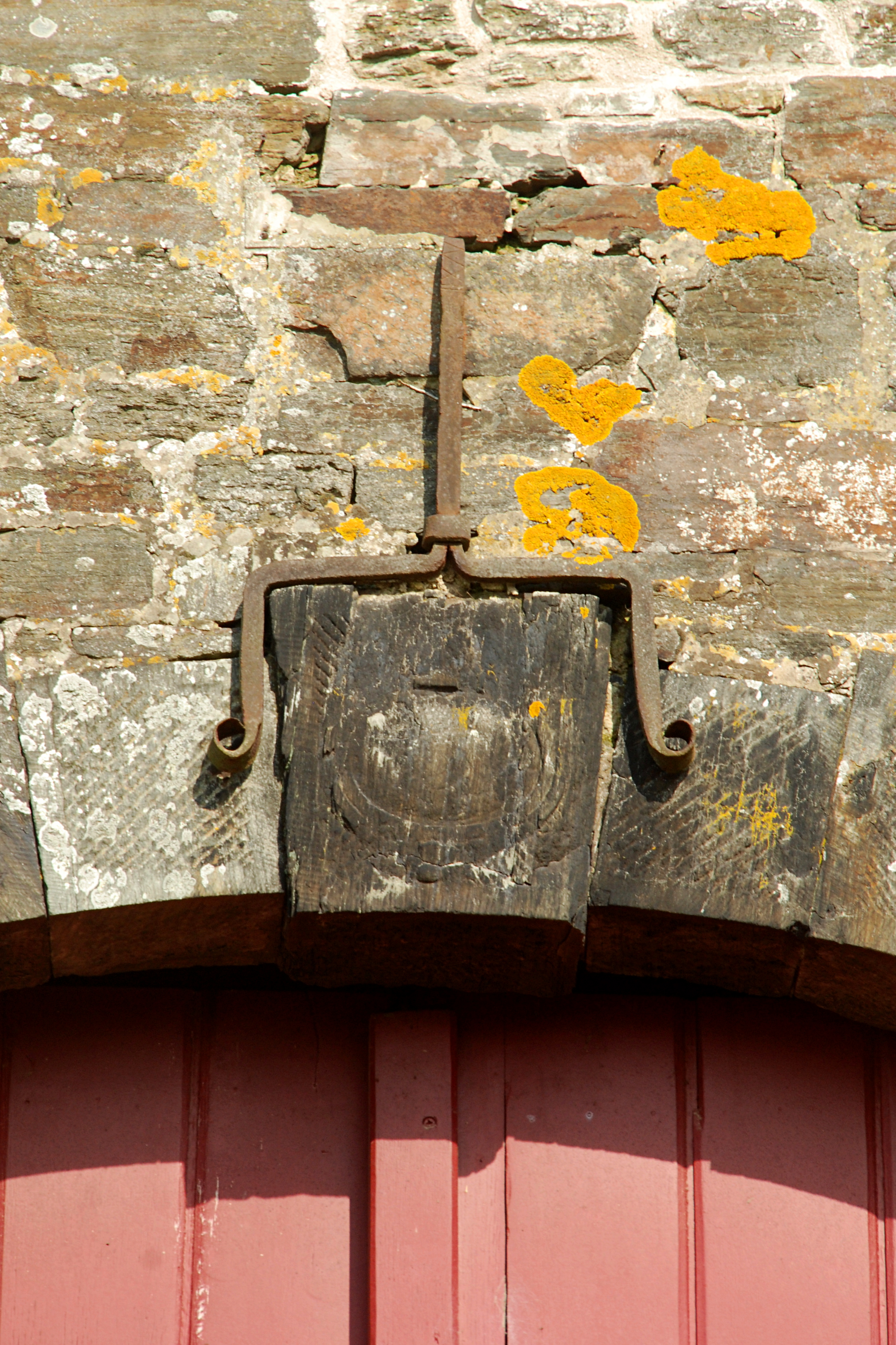 Belgique - Brabant wallon - Villers-la-Ville - Porte de Nivelles